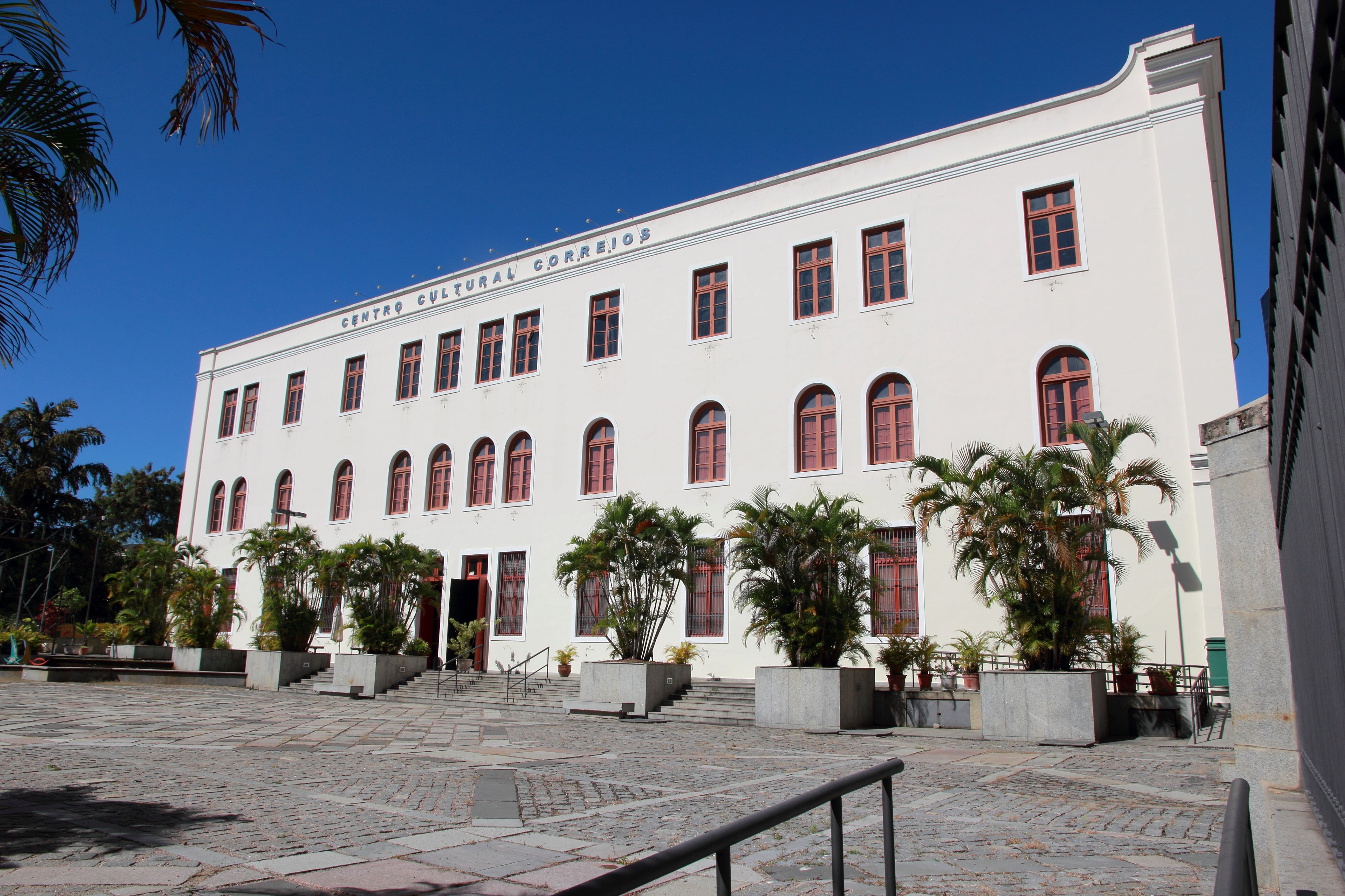 Edifício do Centro Cultural Correios no Rio de Janeiro - Fachada Norte